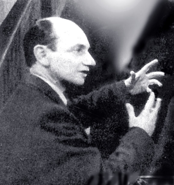 Il regista Carlo Ludovico Bragaglia nel 1942